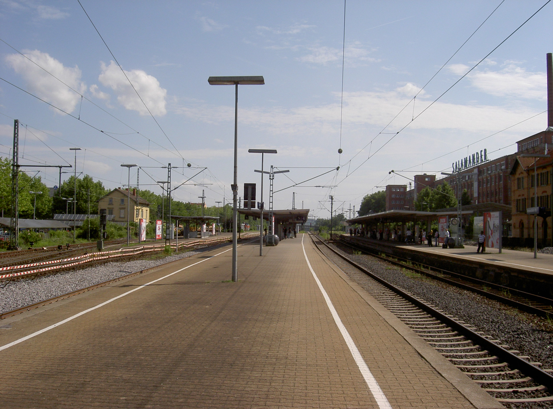 Kornwestheim Personenbahnhof